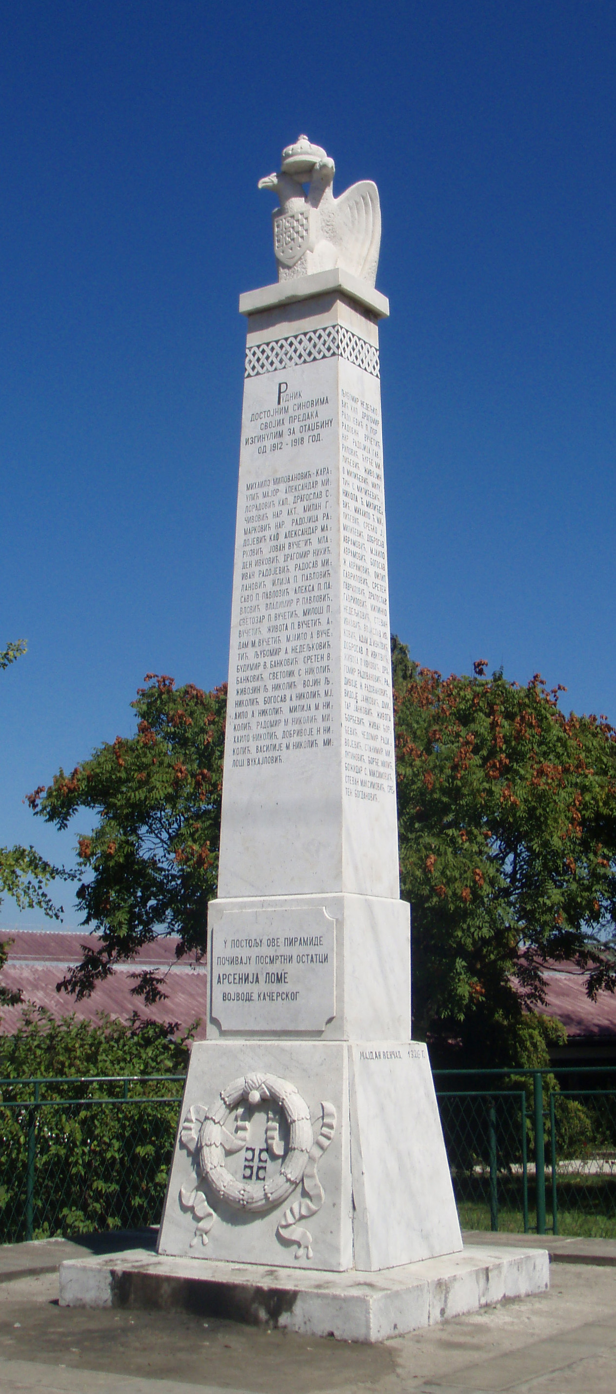 Споменик Арсенију Ломи и ратницима ослободилачких ратова 1912. - 1918. на Руднику. Снимио Ранко Томић.